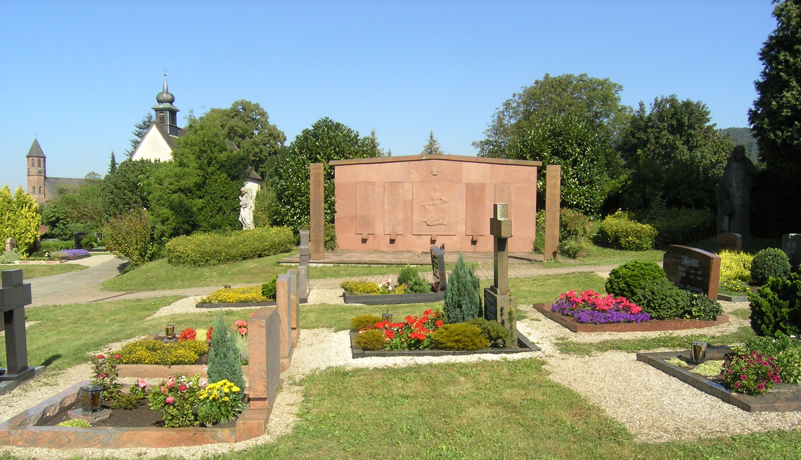 Malsch (Landkreis Karlsruhe), Friedhof. Gefallenendenkmal, Kirche St. Cyriak und St.-Peter-Kapelle